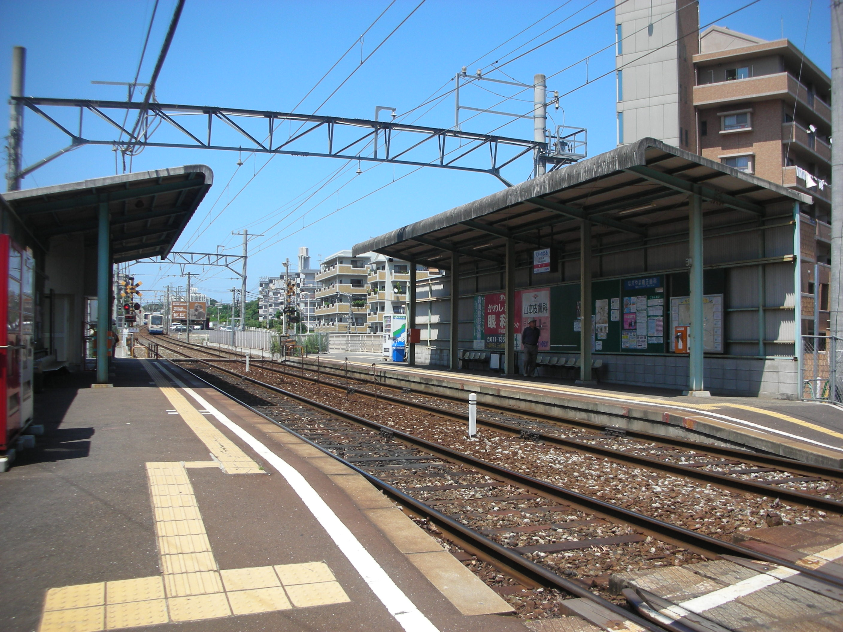 2009/6/16におんさき自身が撮影。筑豊電鉄・永犬丸駅。